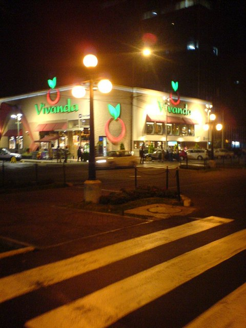 Local de Supermercados Vivanda en la Avenida Pardo en Miraflores - Lima - Peru